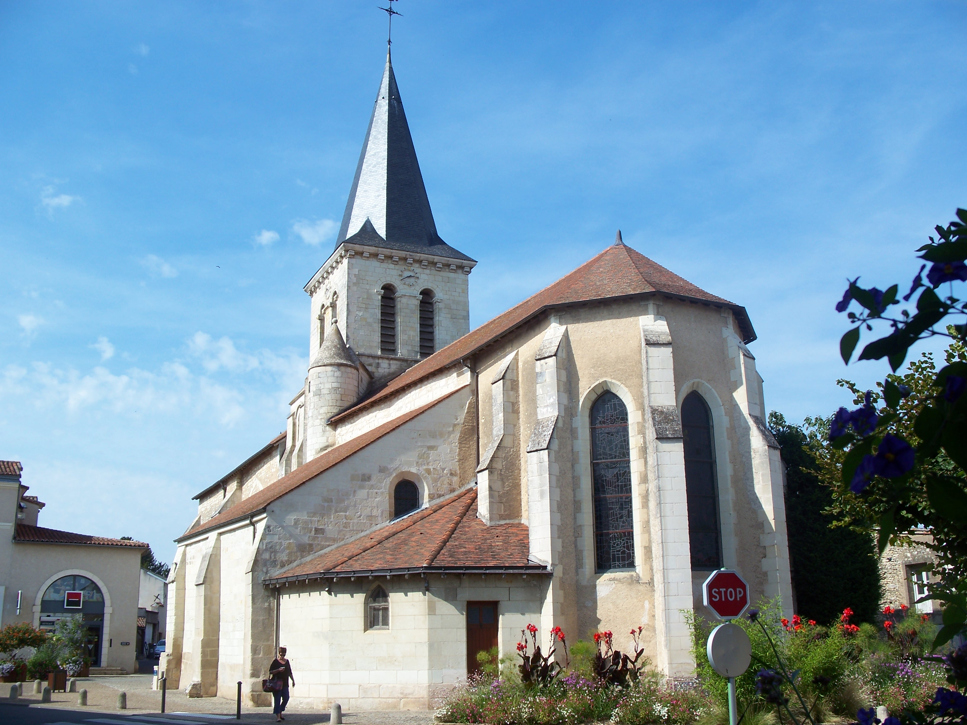 Église Saint-Denis de Jaunay-Clan (Classé) .